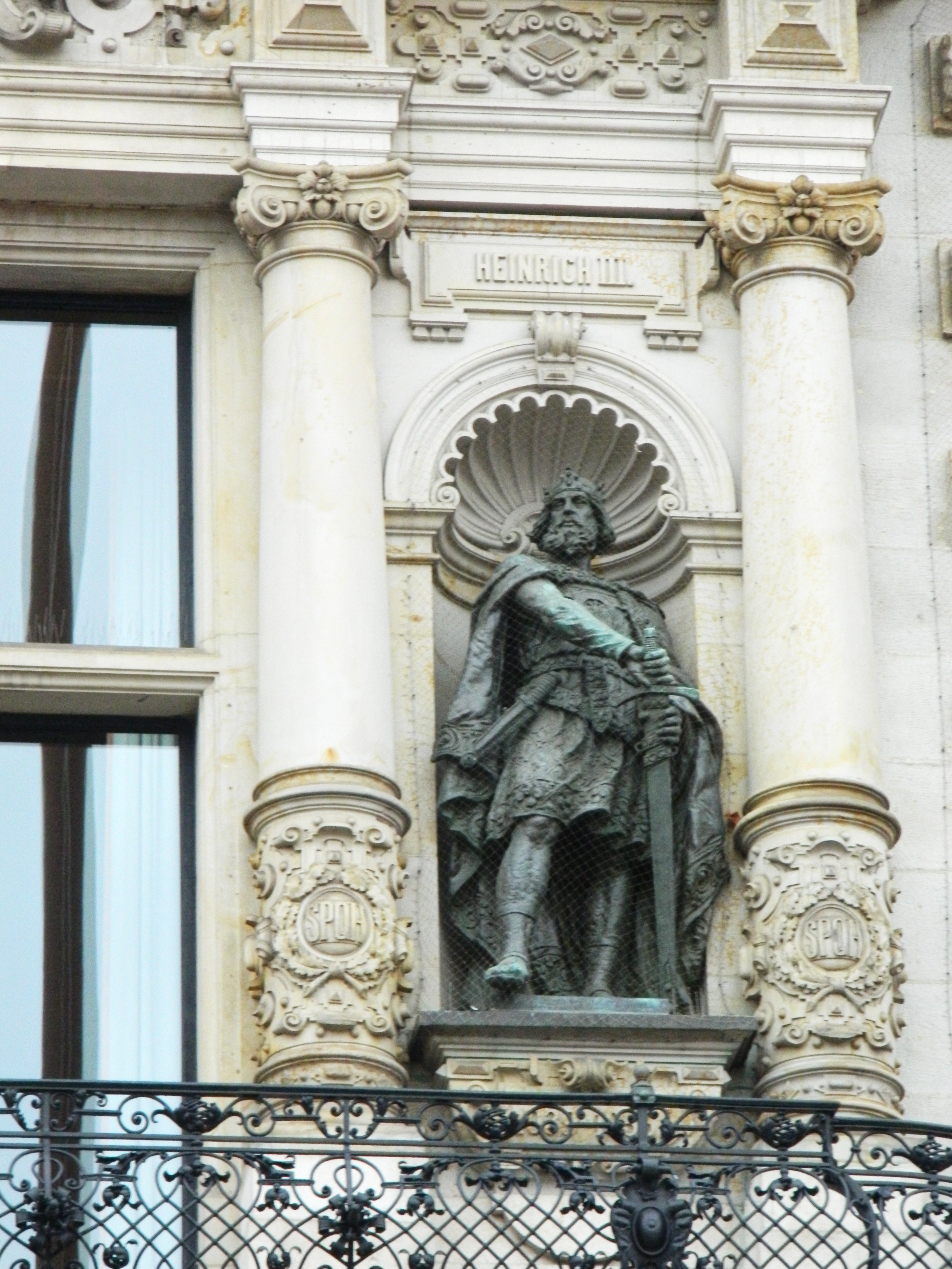 Heinrich III